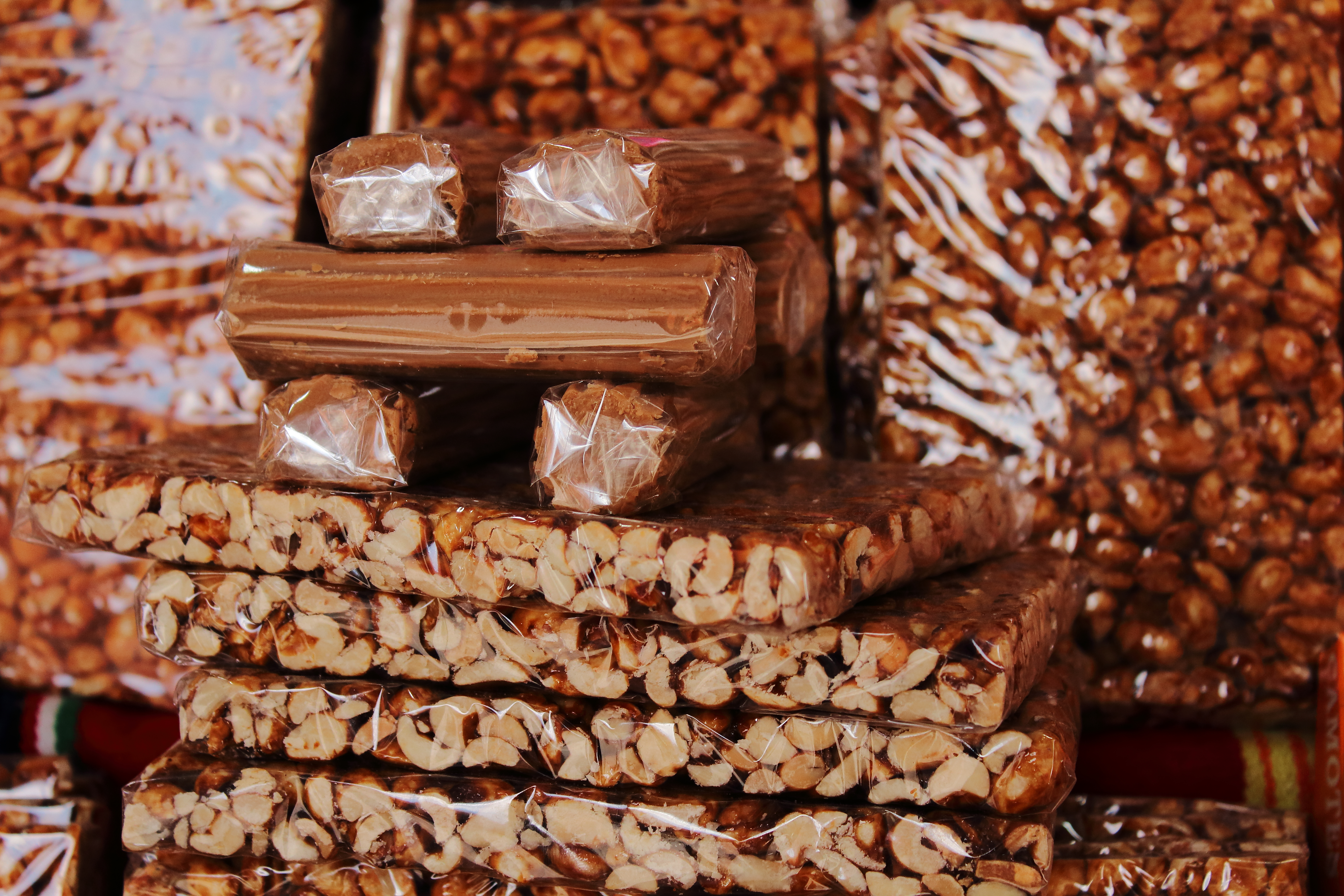 Dulces que vendían fuera del Edificio Carolino de la Benemérita Universidad Autónoma de Puebla. Estos dulces están hechos de cacachuate.